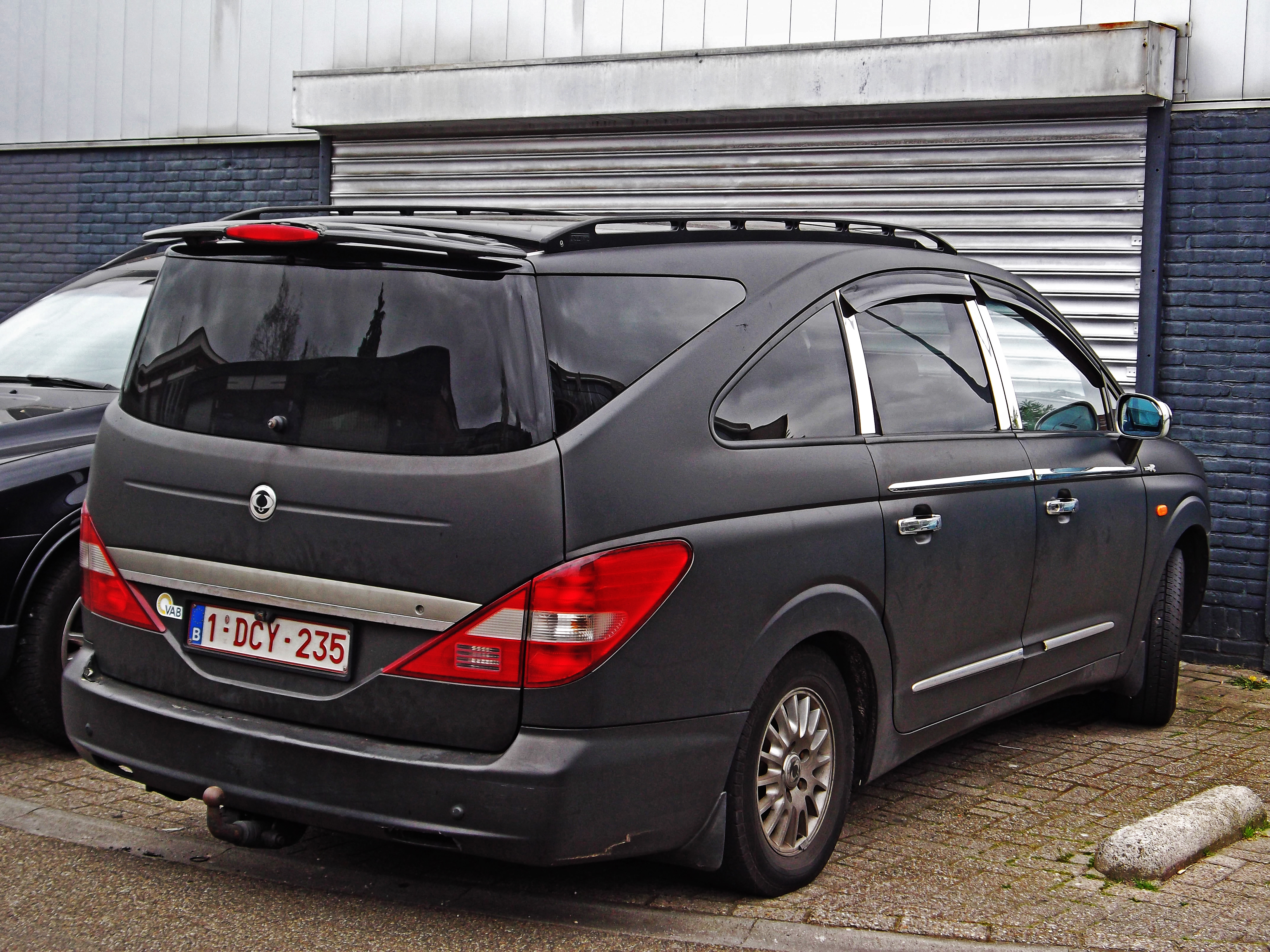 Belgian license plates.